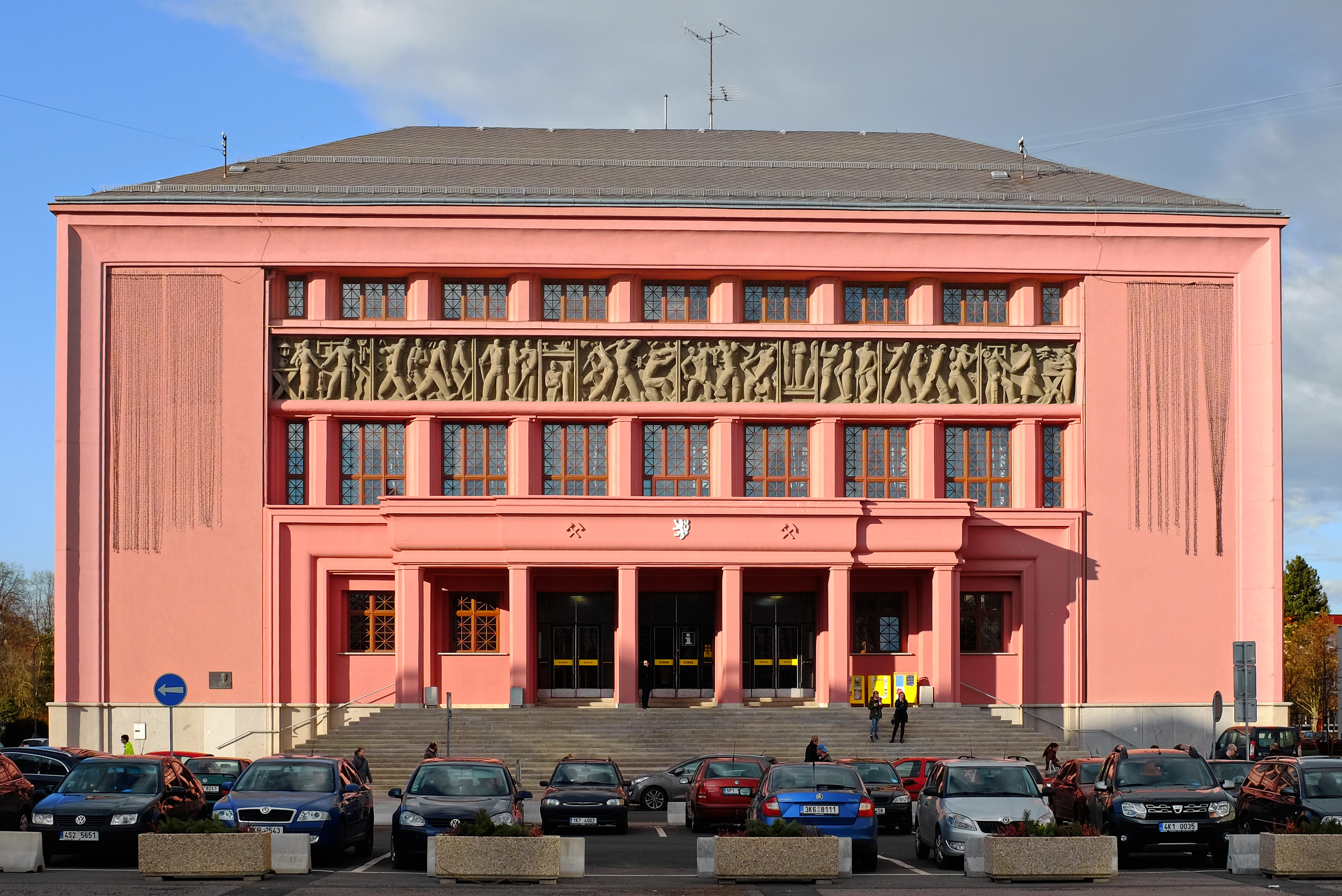 Hornický dům, náměstí Budovatelů, ul. 5. května 655, Sokolov.